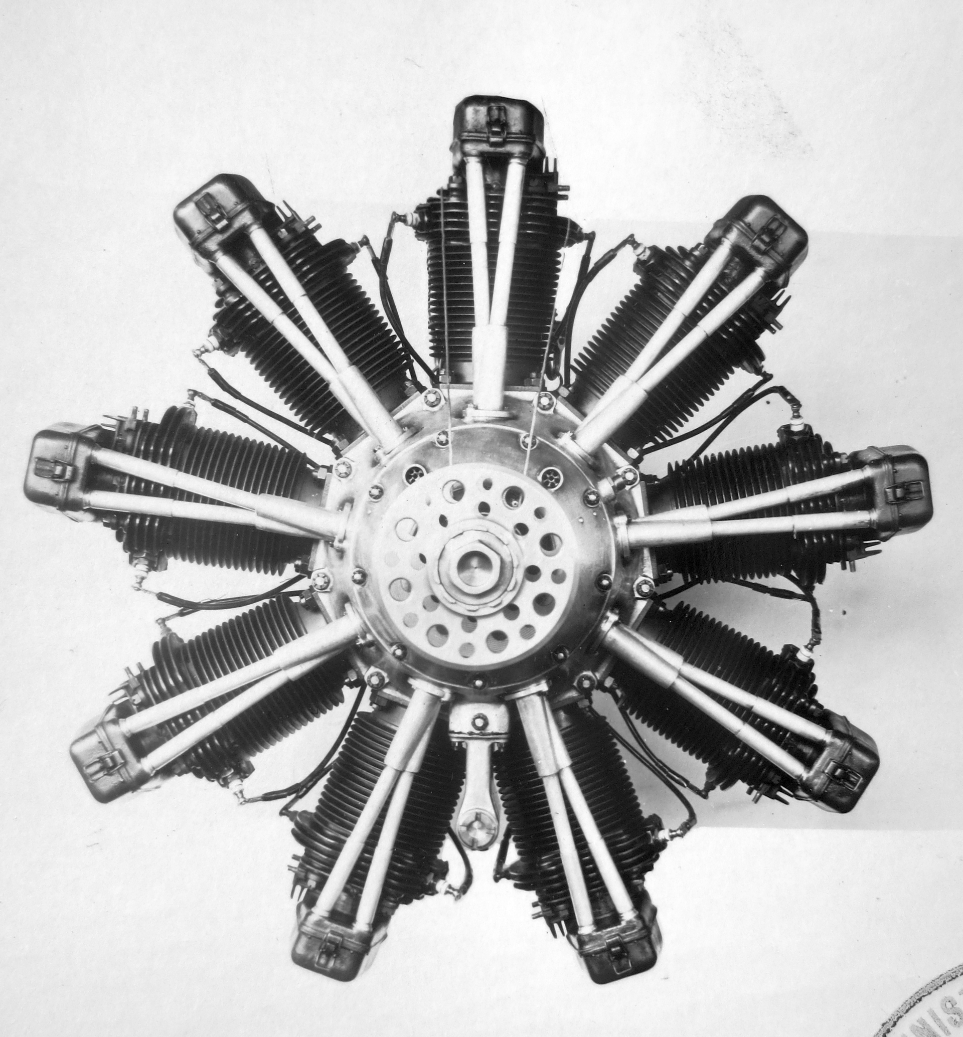 letecký motor Walter Bora C (1934)